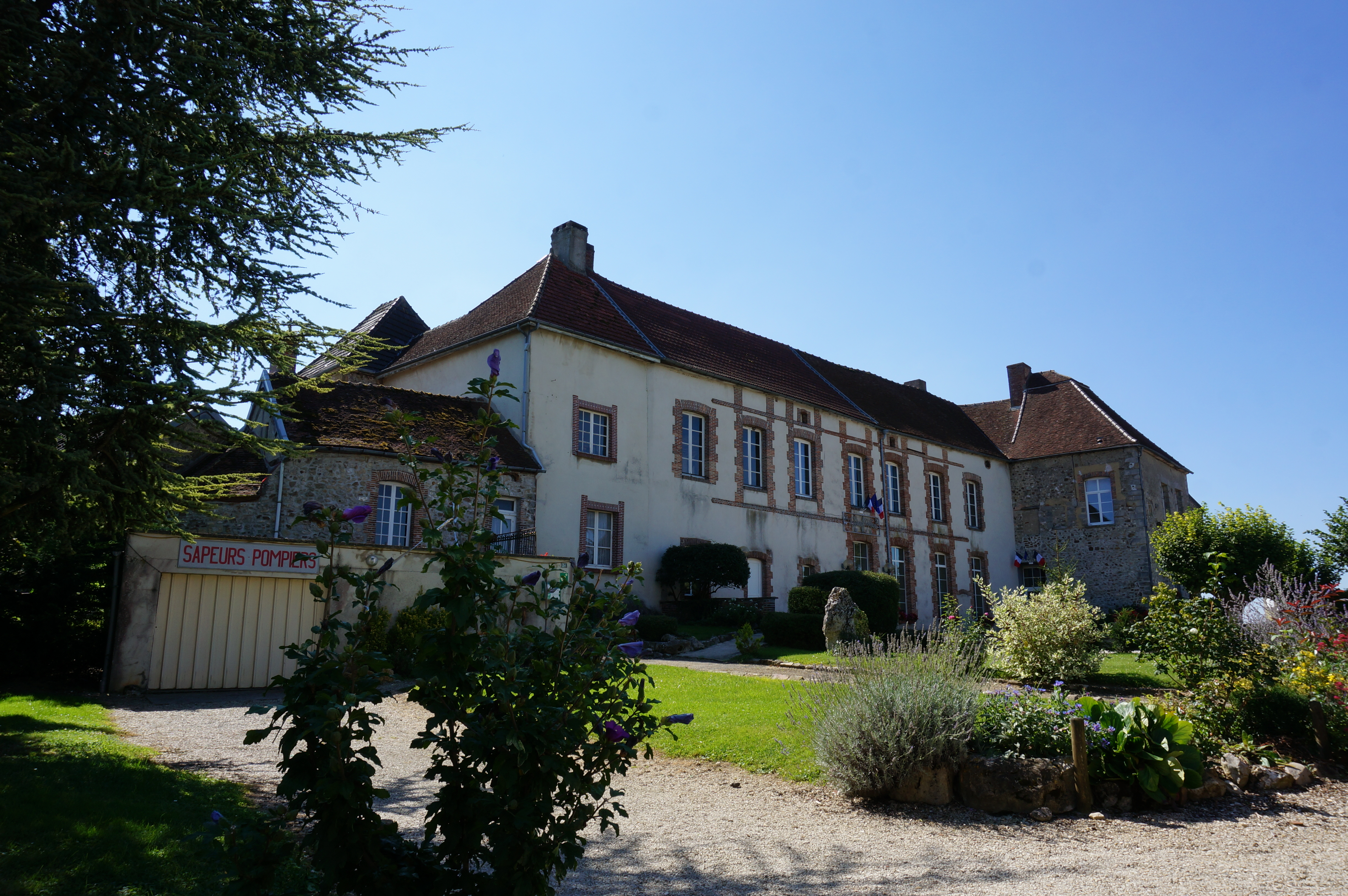 dans le village de Broyes.